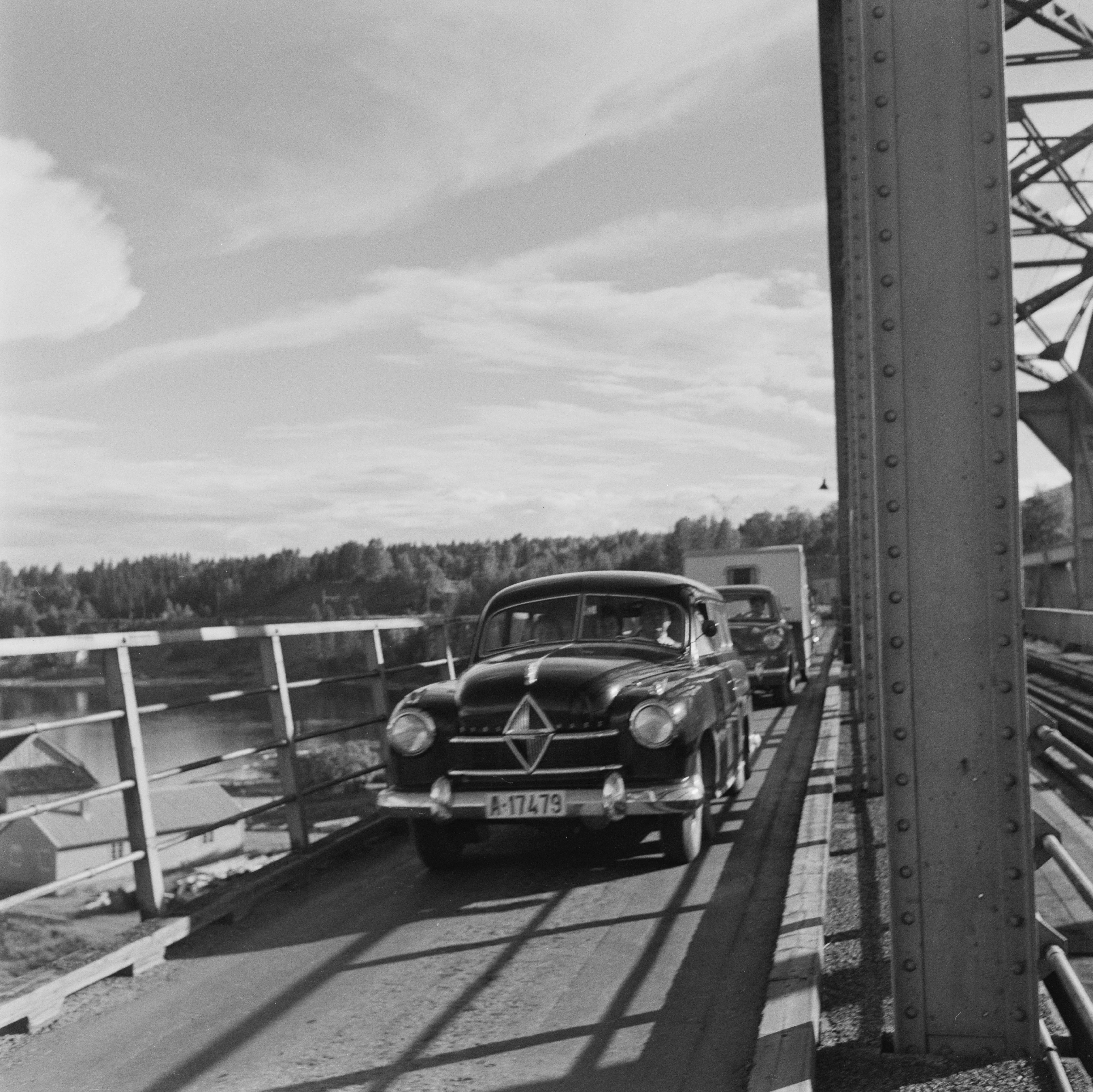 Bildet er hentet fra Arkivverket. Minnesundbrua, innkjørsel. Arkivinstitusjon : Riksarkivet Arkivnavn : Billedbladet NÅ Sted : Norge, Akershus, Eidsvoll, Minnesund Emneord: Bro, Samferdsel, Trafikk, Biler, Veier Avbildet